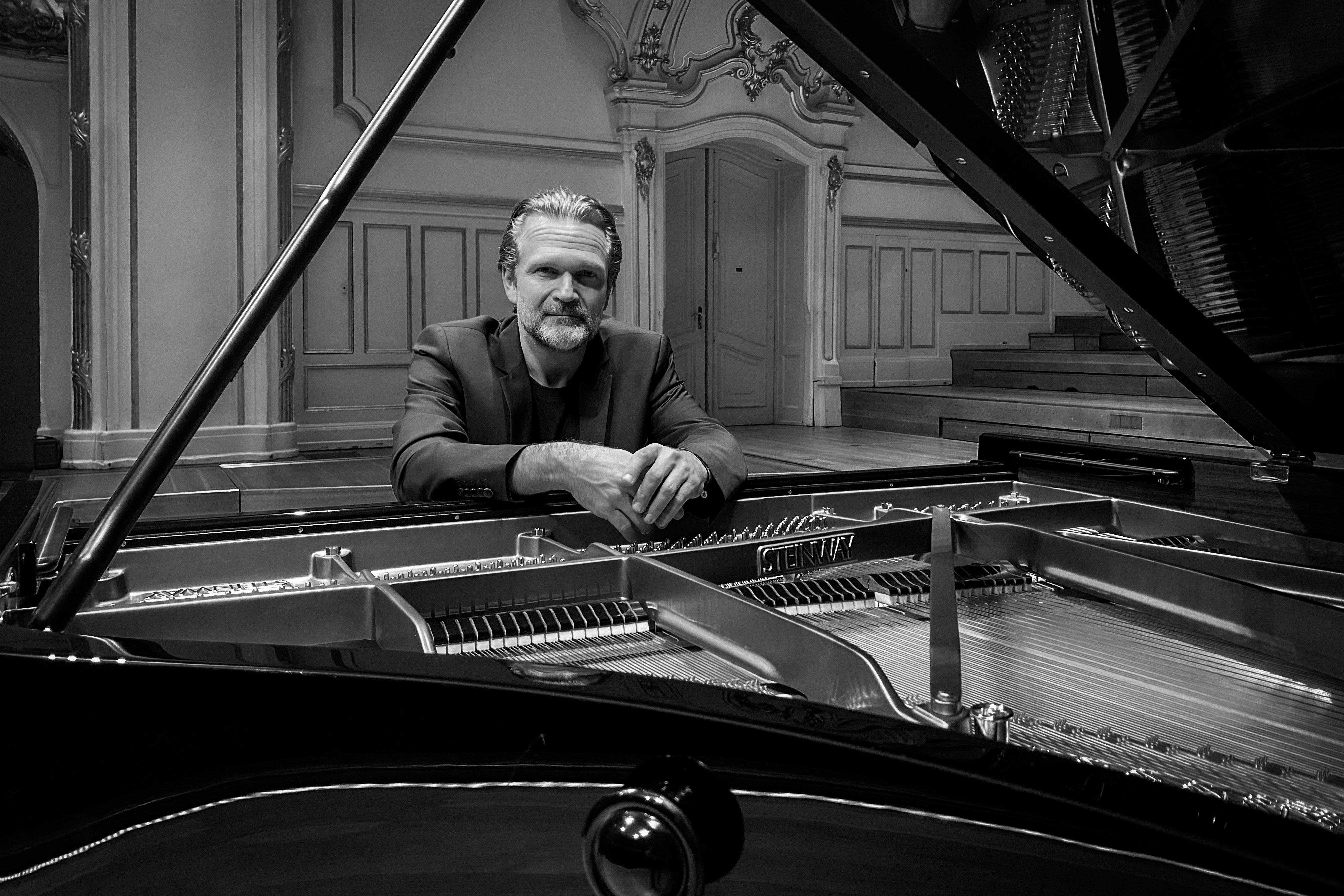 Sebastian Knauer am Klavier in der Laiszhalle